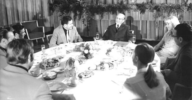 ADN-ZB-Mittelstädt-14.9.72-ba Berlin: Erfolgreiche Olympiateilnehmer beim Vorsitzenden des Staatsrates- Mitglieder der Leitung und der erfolgreichen DDR-Mannschaft zu den XX. Olympischen Sommerspielen 1972 besuchten am 14.9.72 den Vorsitzenden des Staatsrates der DDR, Walter Ulbricht (Mitte); an der linken Tischseite (beginnend bei W. Ulbricht) Manfred Ewald, Klaus Köste, Rudi Hellmann und Hartmut Briesenick; an der rechten Tischseite Rita Kühne, der Sekretär des Staatsrates, Heinz Eichler, und Angelika Hellmann. (Siehe dazu ADN-Meldung 1914 vom 14.9.72)